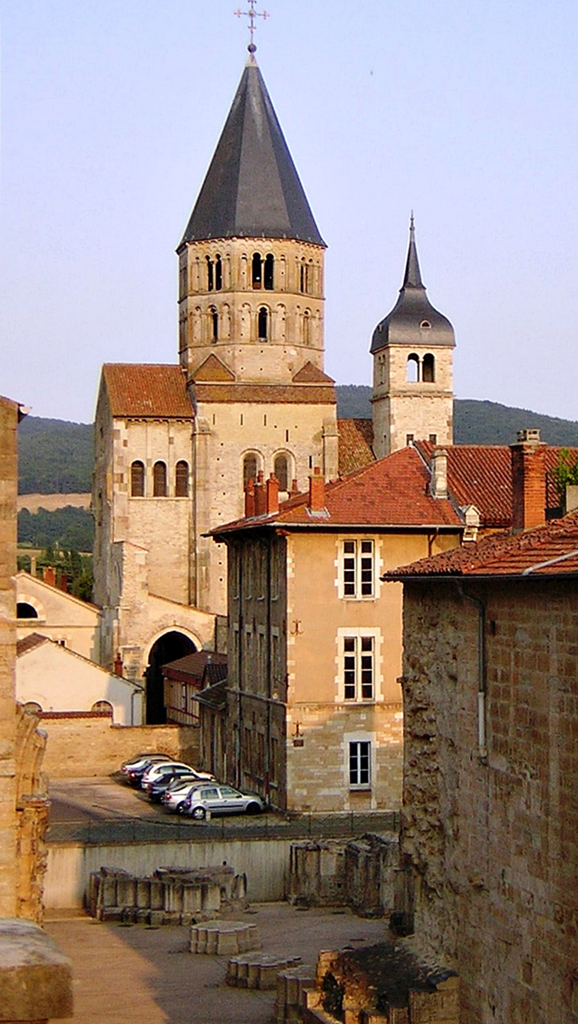 Cluny, la basilique avec les excavations.